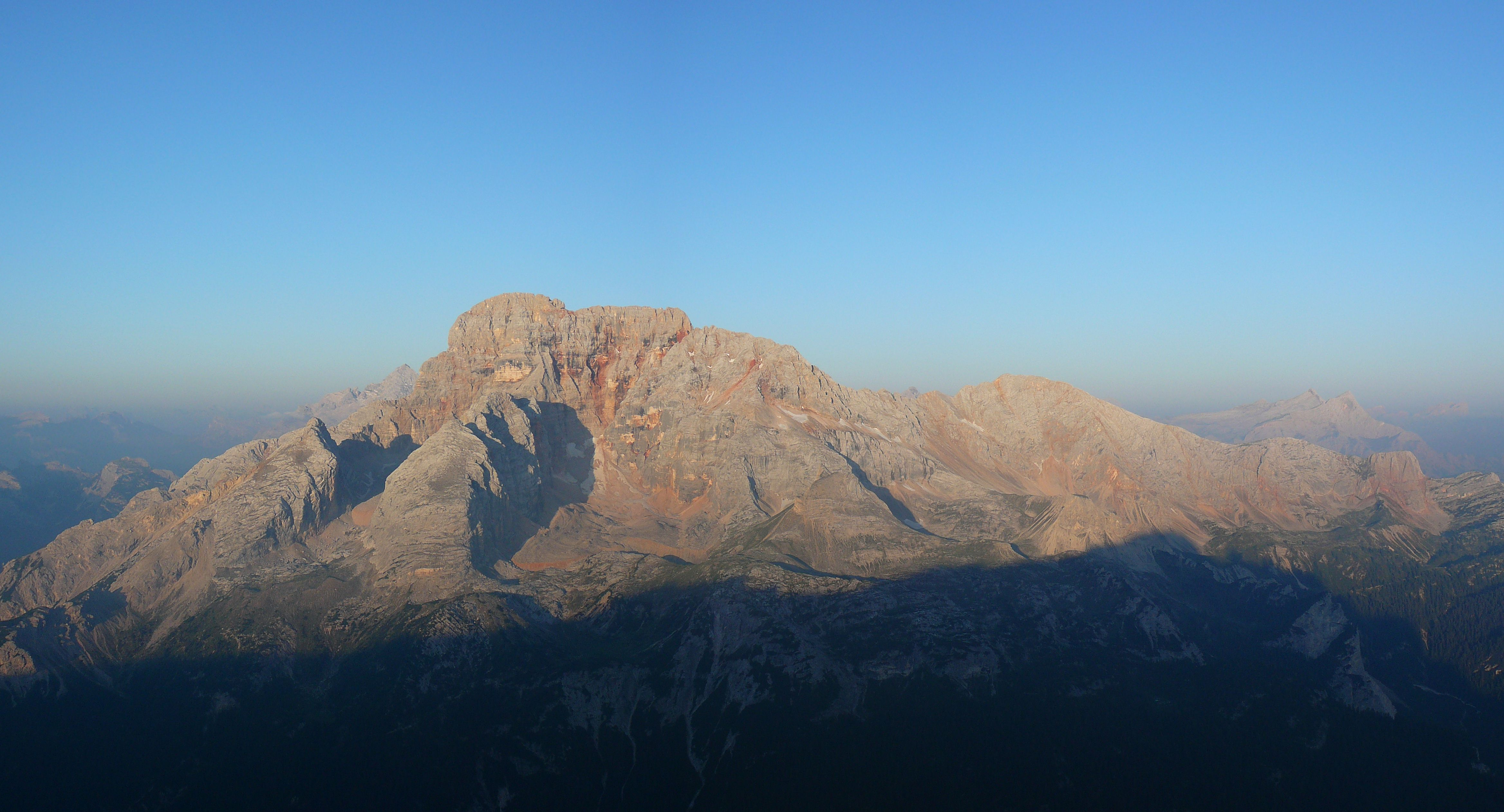 Croda Rossa d'Ampezzo dal Picco di Vallandro